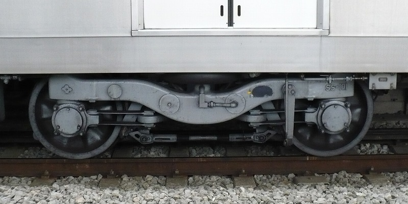 地下鉄8000系の台車